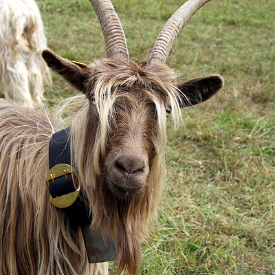 Kupferhalsziege - Projekt von ProSpecieRara